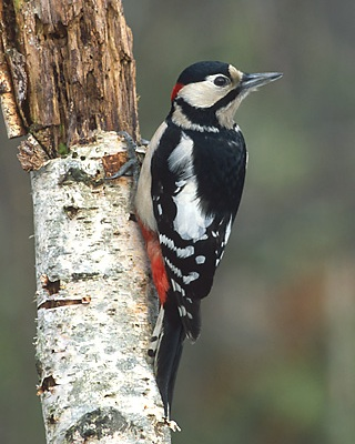 Dendrocopos major